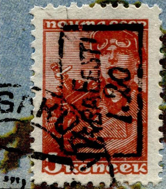 Почтовая марка Мыйзакюла (Эстония)